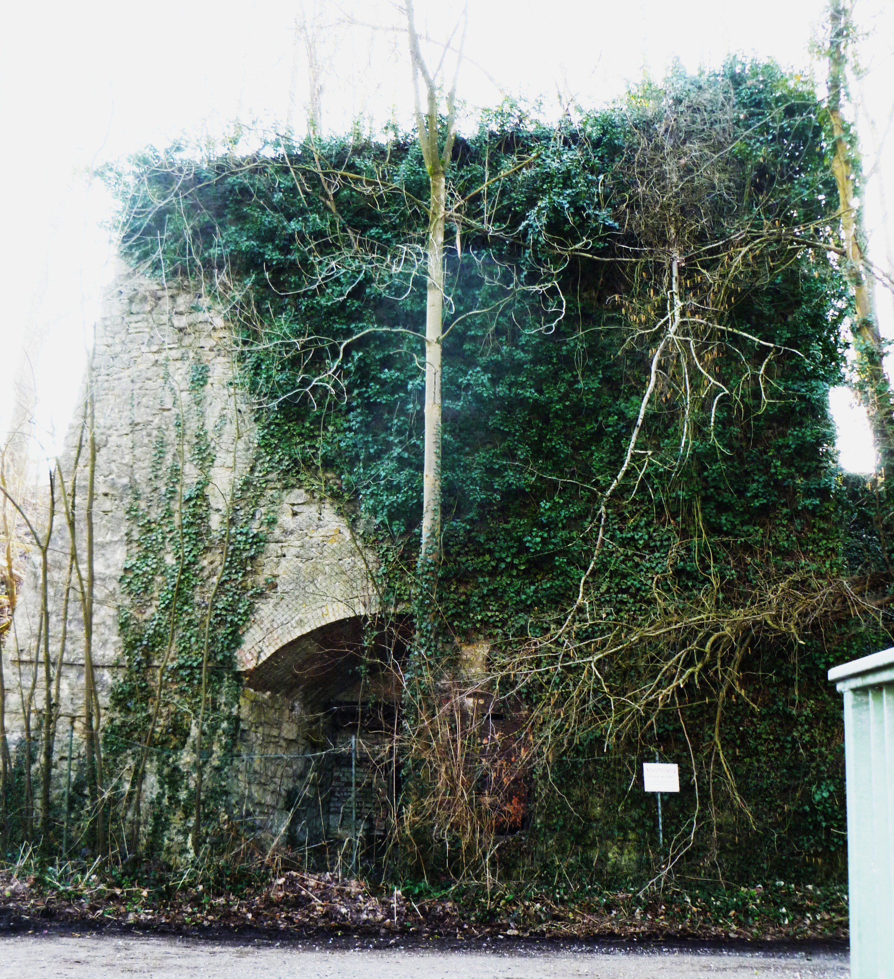 Kalkofen Hahner Mühle in Aachen-Hahn; Baujahr 1920; Hahner Straße